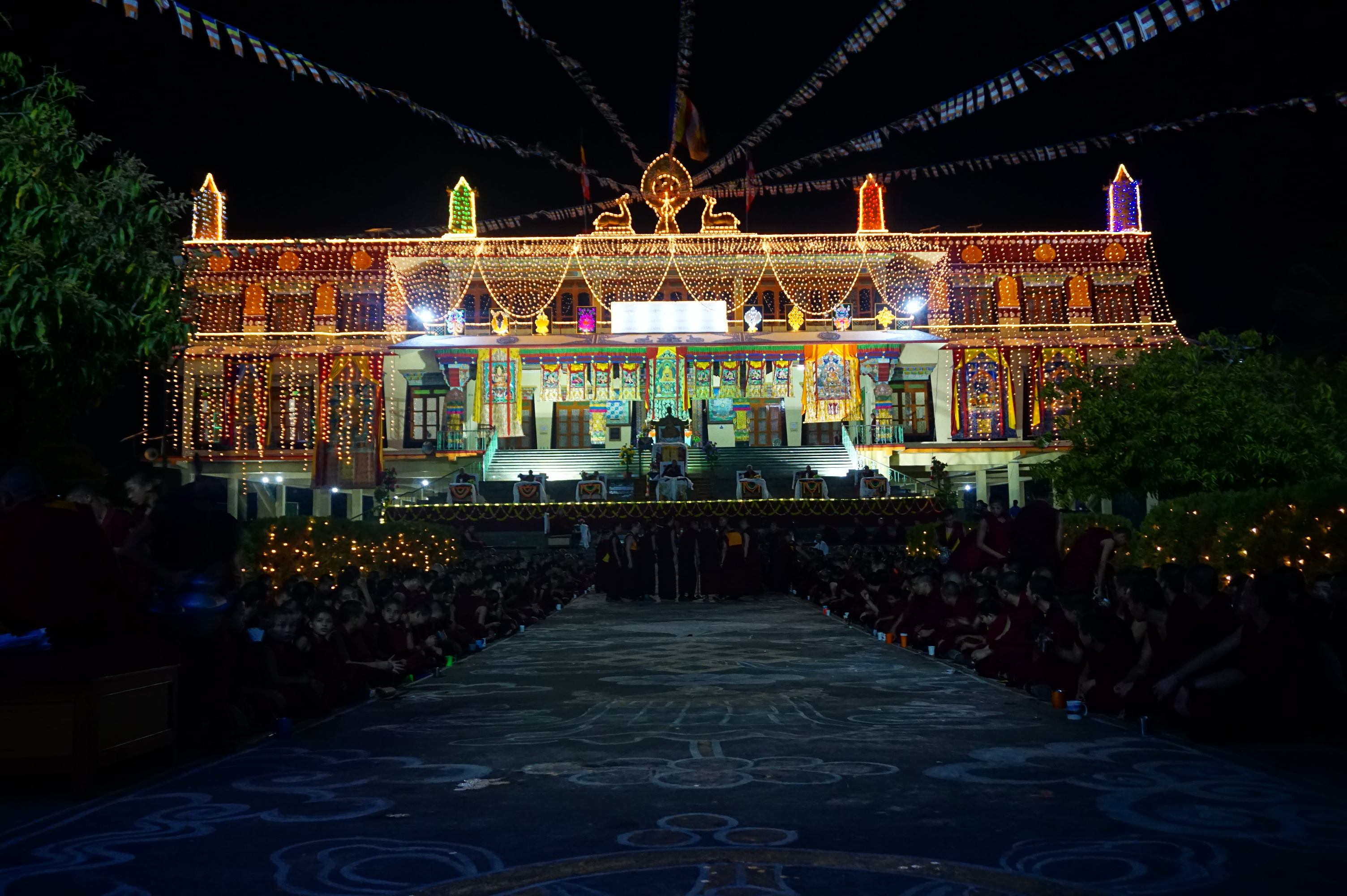 Jang Gunchoe overnight debate at Drepung Gomang Monastery (Karnataka - India)